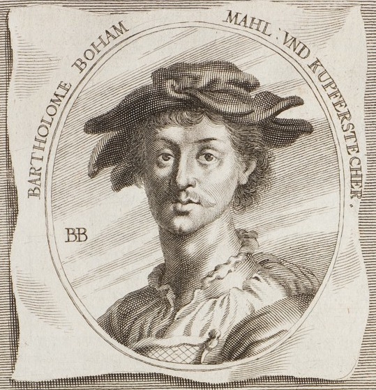 Portrait de Barthel Beham. Détail d'une estampe tirée de Teutsche Academie der Bau-, Bild- und Mahlerey-Künste, par Joachim von Sandrart, 1683.